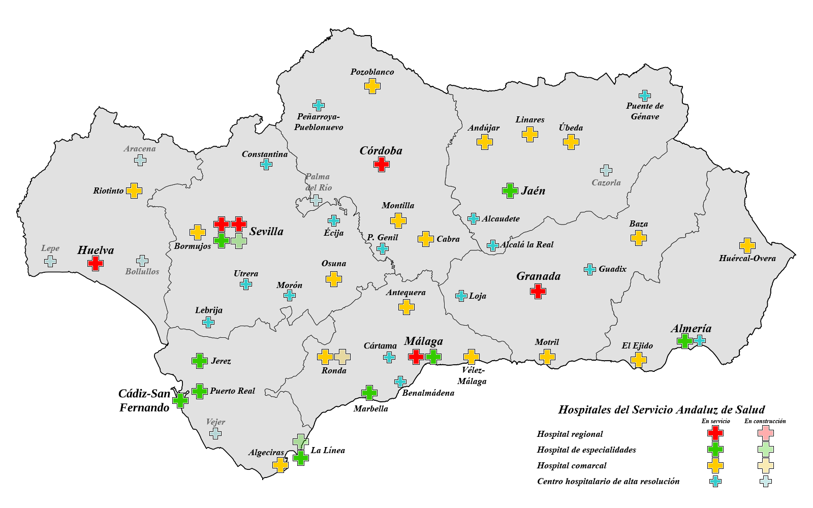 Hospitales del Servicio Andaluz de Salud. Fuente